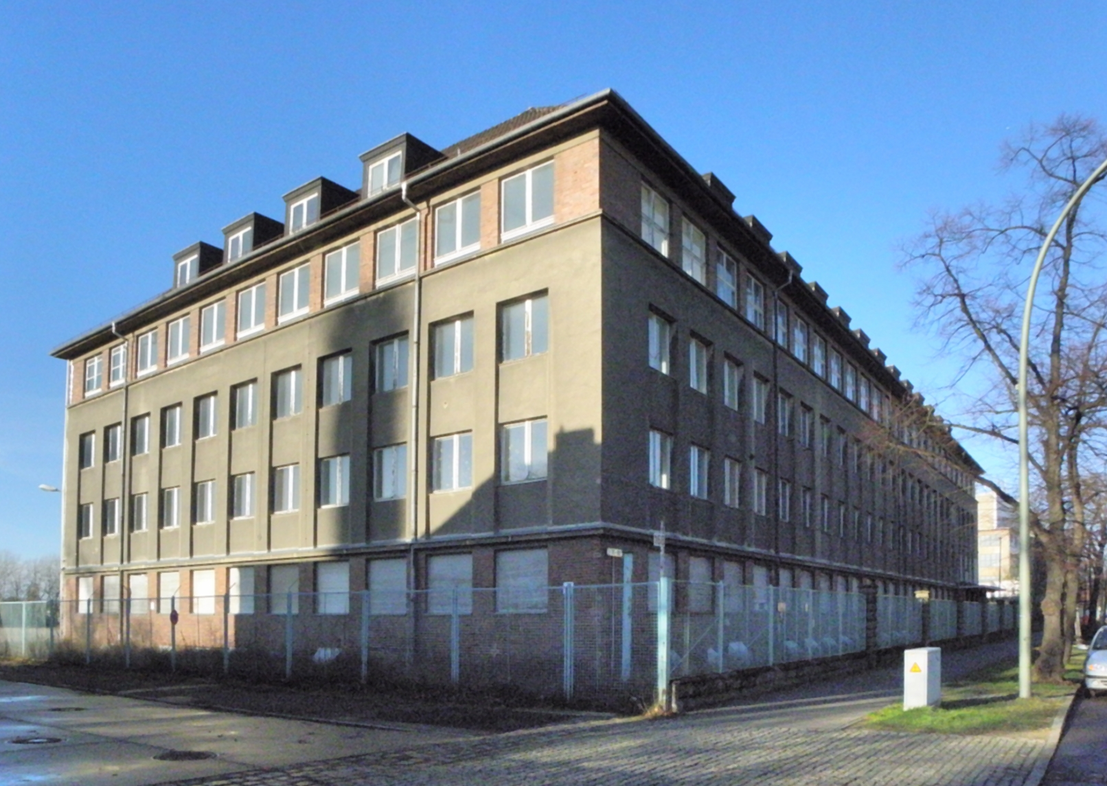 Straße in Berlin-Köpenick: Wendenschloßstraße